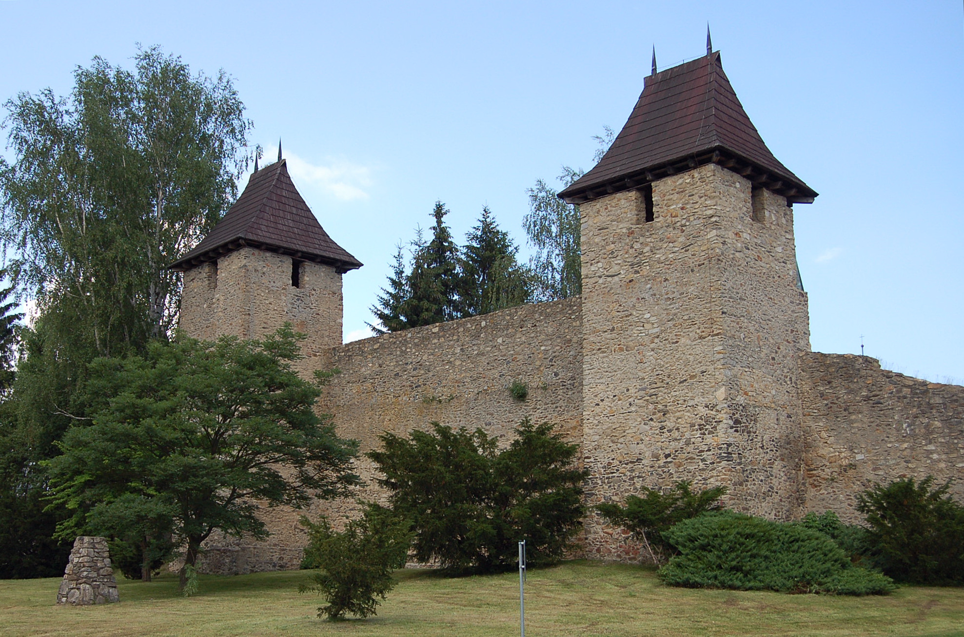 Tachov-Stadtmauer